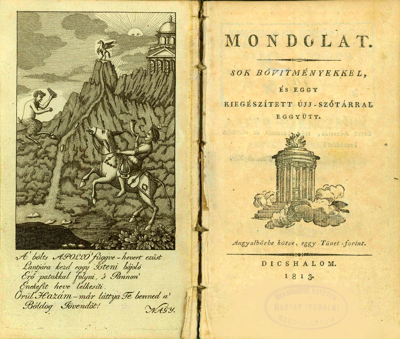 Az 1813-ban Veszprémben megjelent Mondolat jelentősége abban áll, hogy egy olyan országos vitát indított el, mely a végső soron a nyelvújítás dilemmáinak tárgyilagos és józan mérlegeléséhez vezetett.